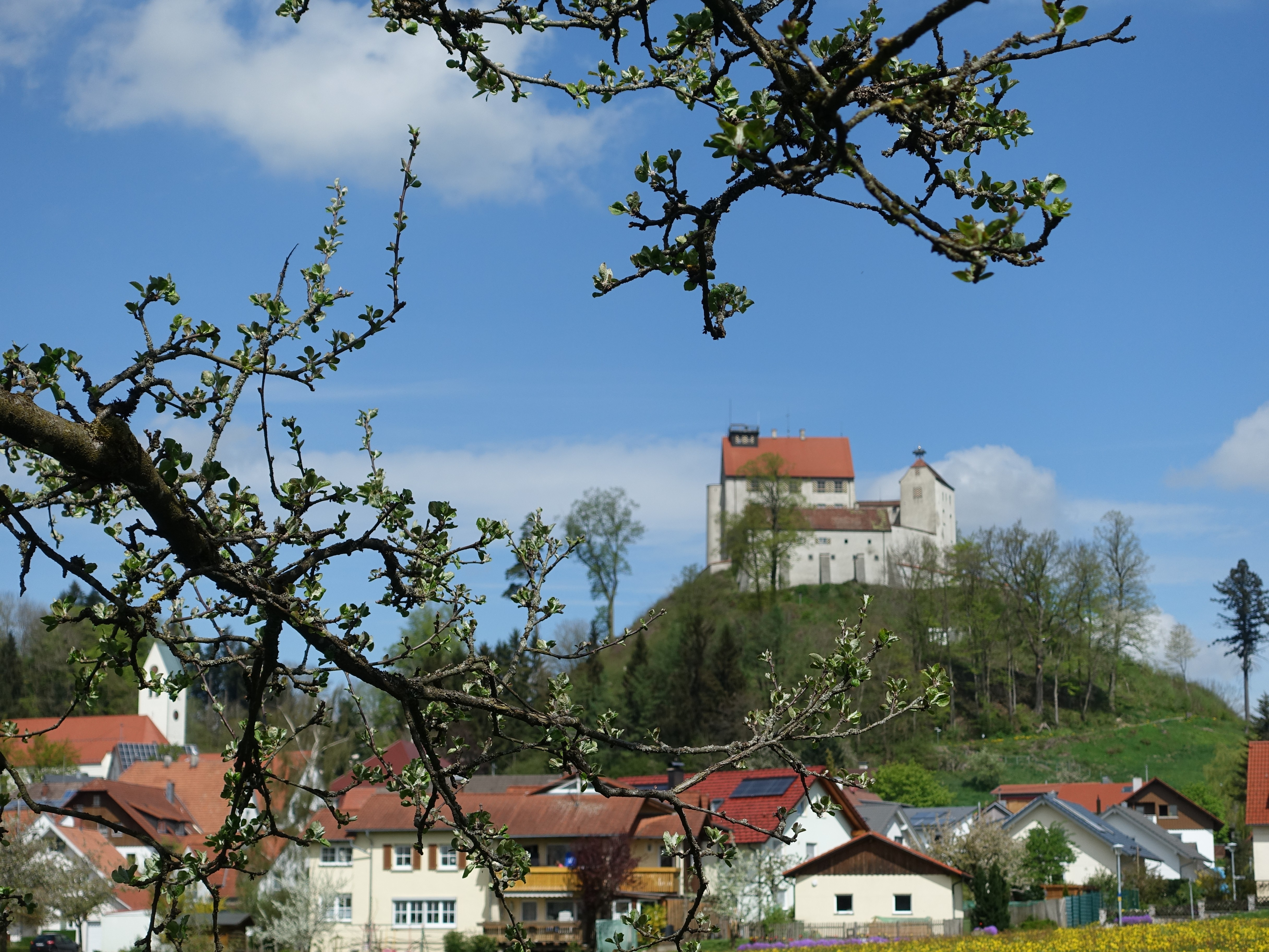 Waldburg - Über der Gemeinde - die mittelalterliche Burg